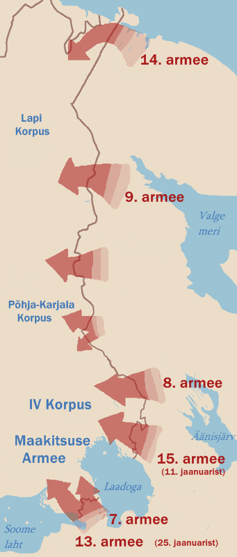 Talvesõja ülevaade